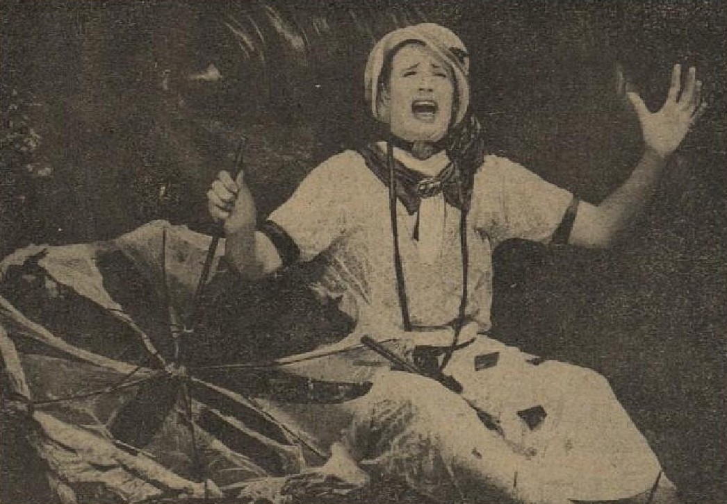 Milka Balek-Brodská (1888-1961), česká divadelní a filmová herečka.